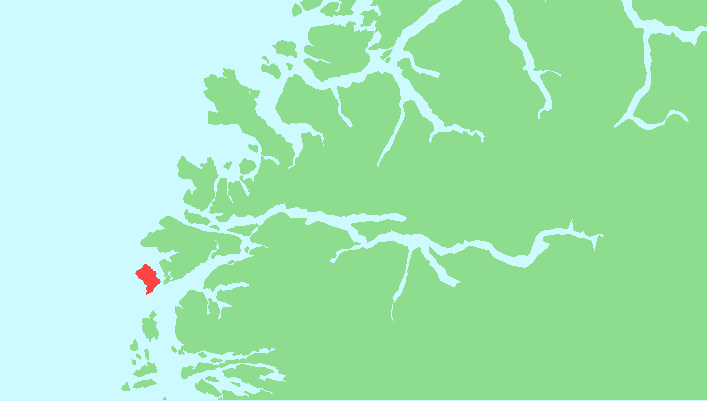 Locator map of Frøya, Sogn og Fjordane, Norway